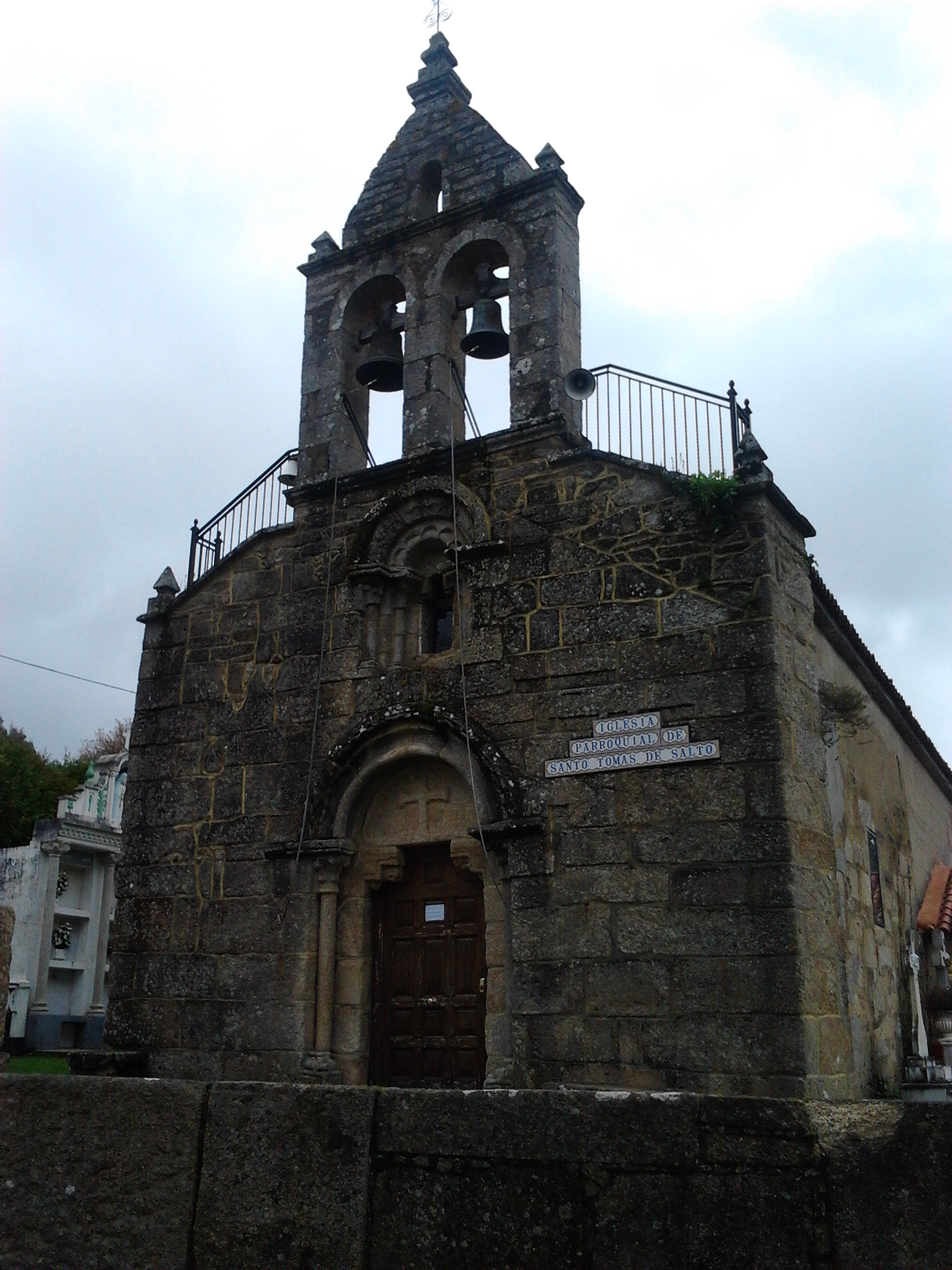 Fachada da igrexa parroquial de Santo Tomé de Salto, Concello de Oza-Cesuras